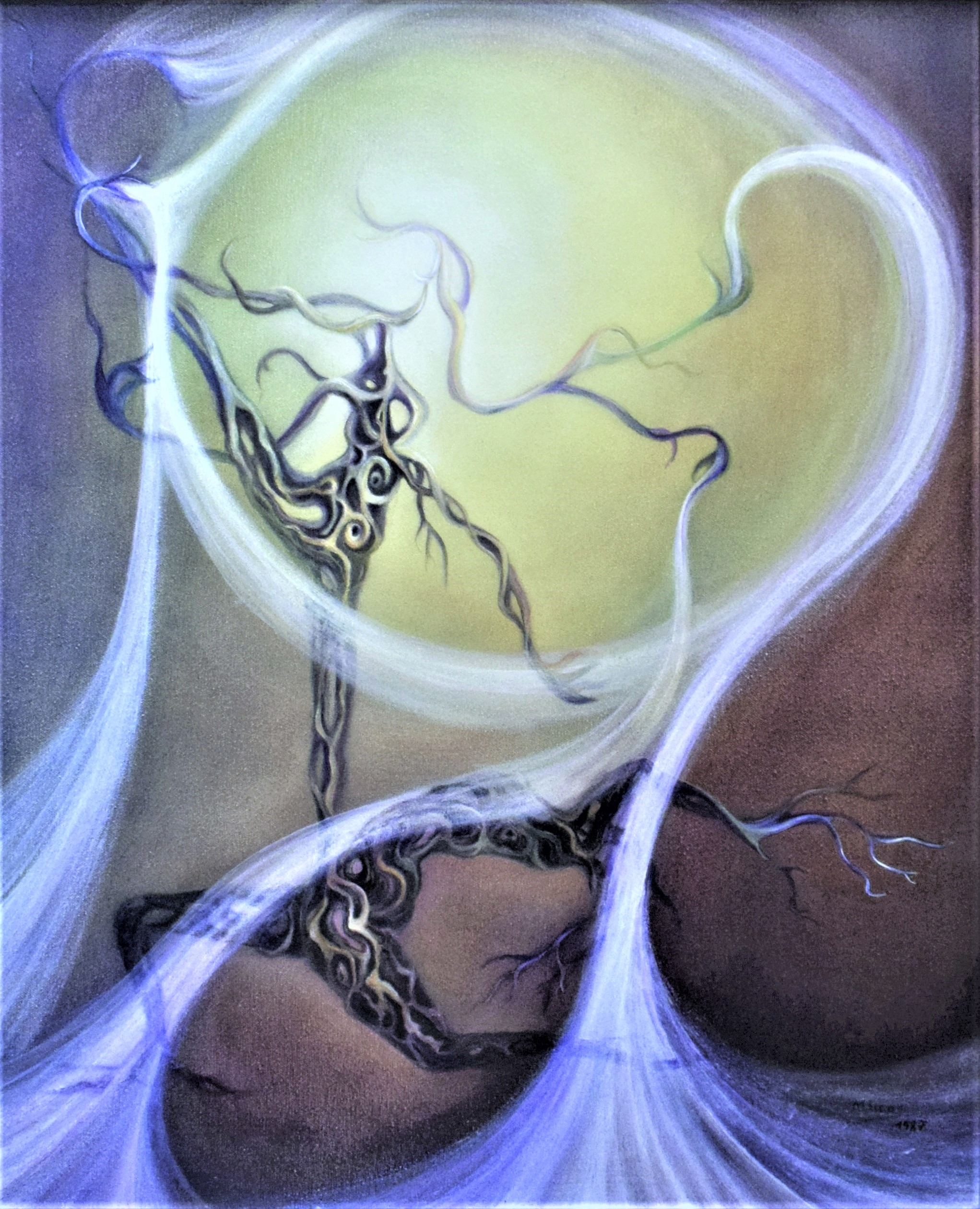 Ce tableau est un exemple de la recherche mystique de Martine Doos